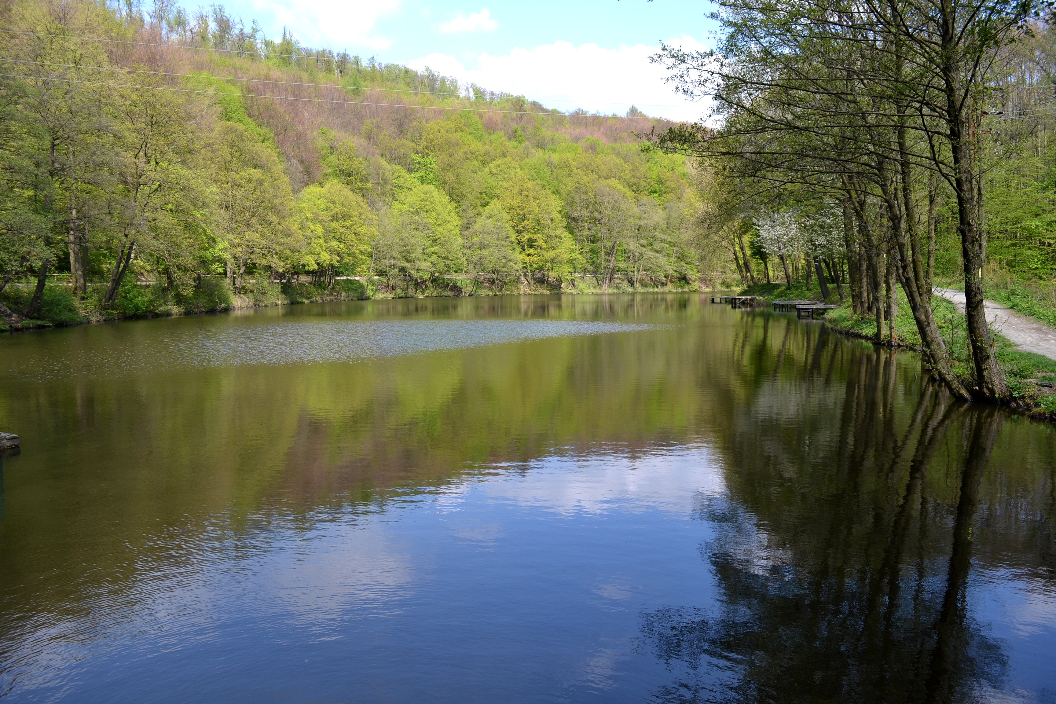 Mlynská dolina. Prvé jazero